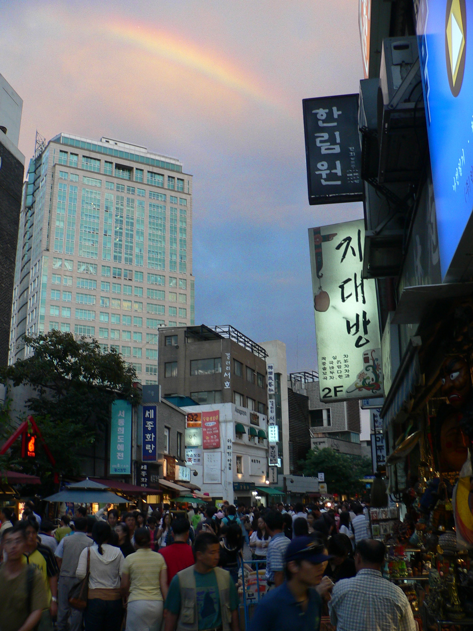 Insadong, Seoul, Korea